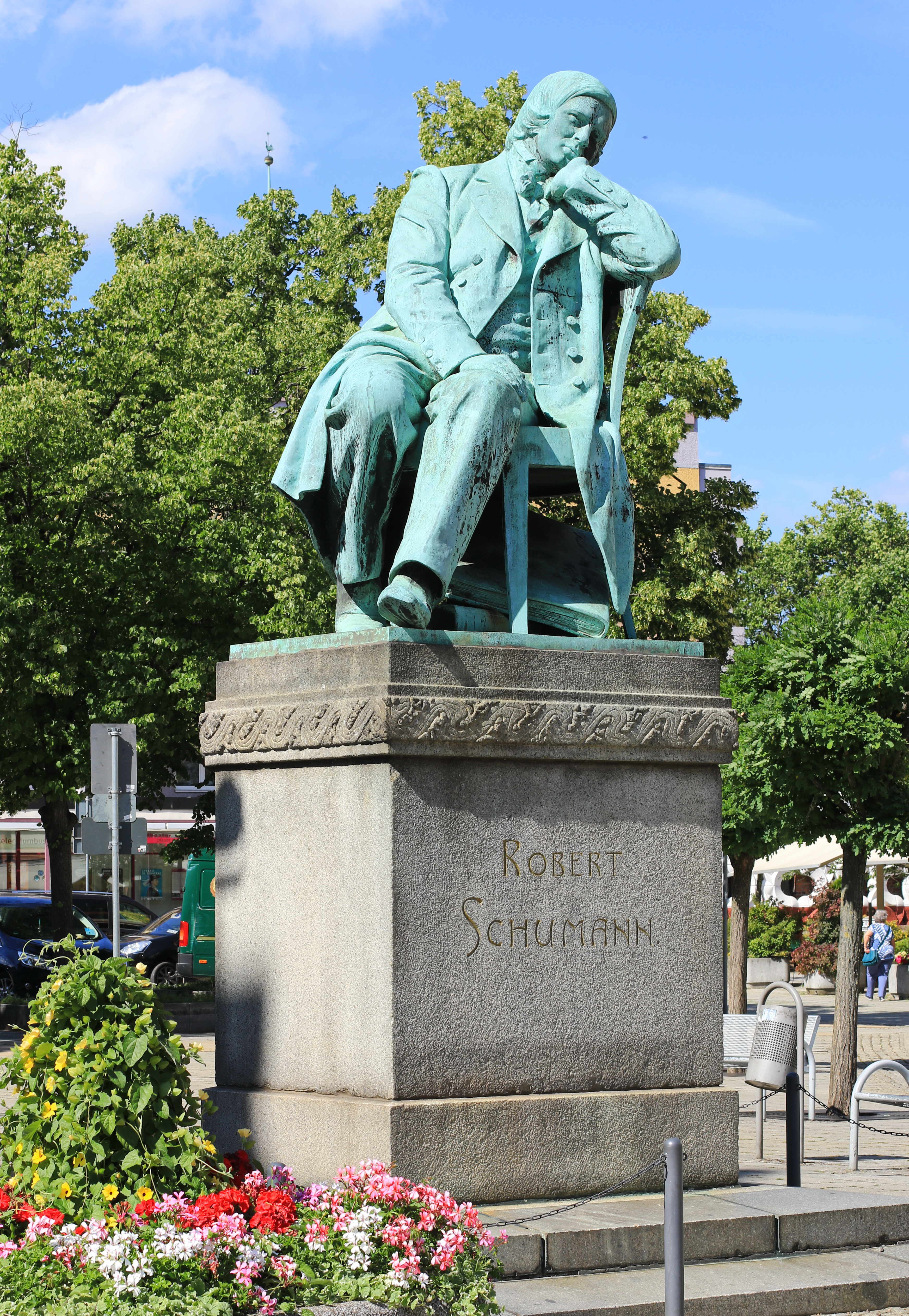 Robert-Schumann-Denkmal in Zwickau.